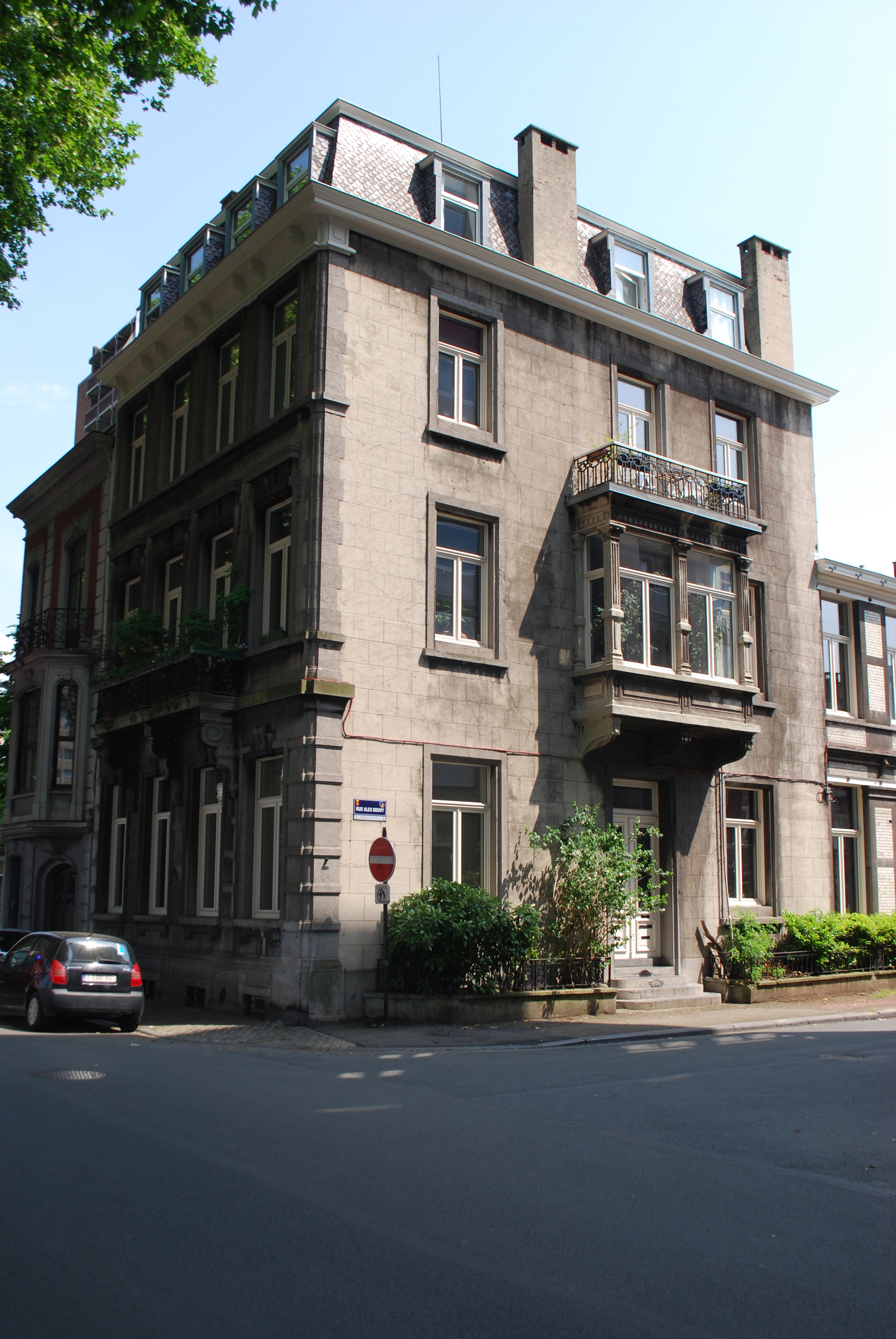 Vue des bords de Meuse à Liège, entre le pont Atlas et le pont Maghin.